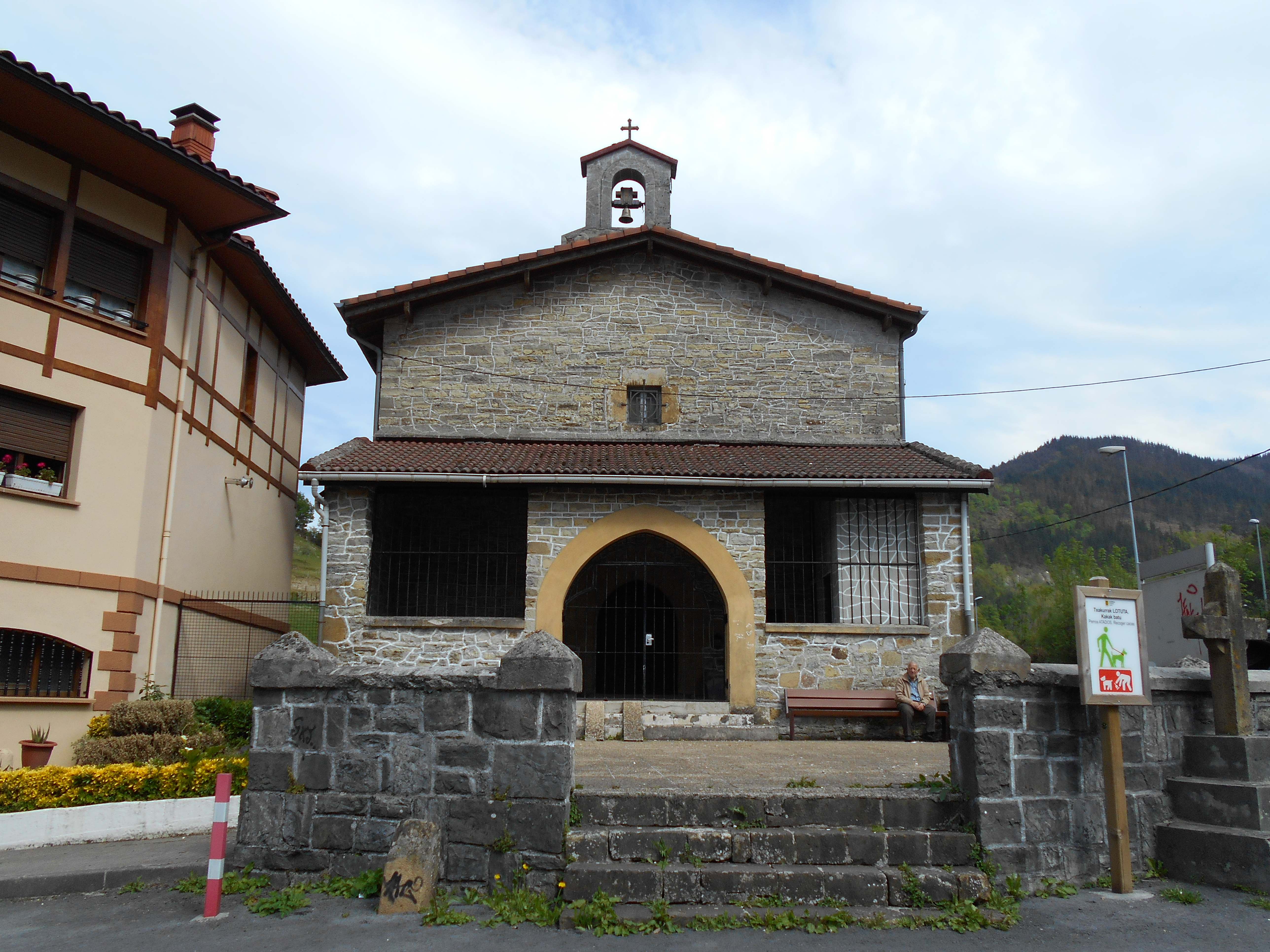 Ermita San Lorenzo Baseliza Sallabente (Zaldibar)